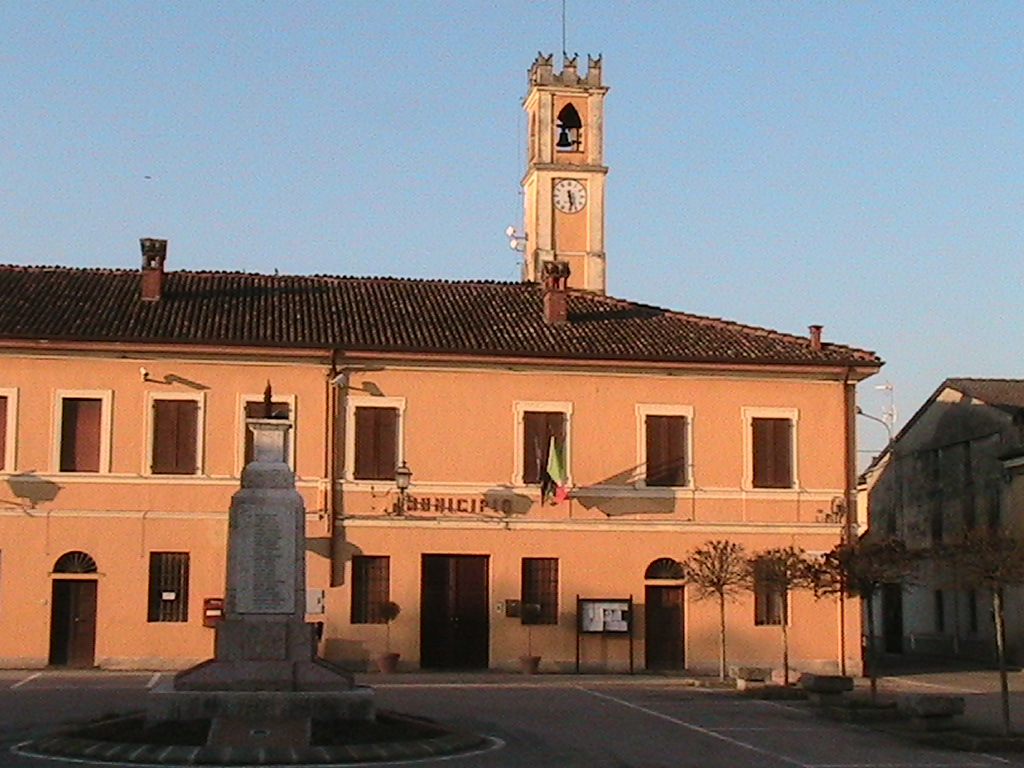 Ca' d'Andrea - Municipio